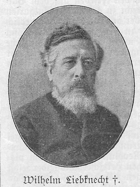 Wlhelm Liebknecht, Sozialdemokrat